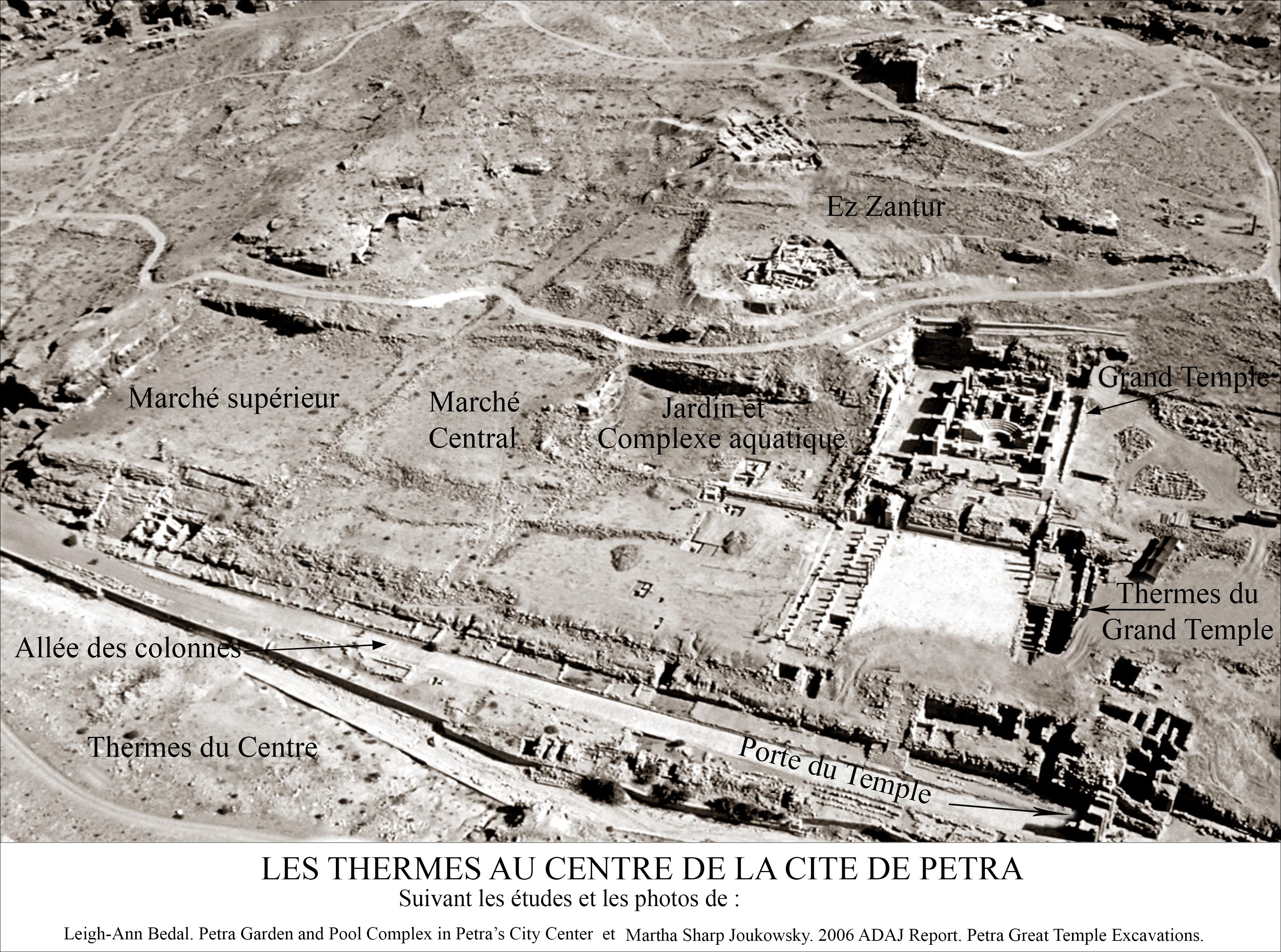 Les différents thermes au centre de la cité de Pétra.